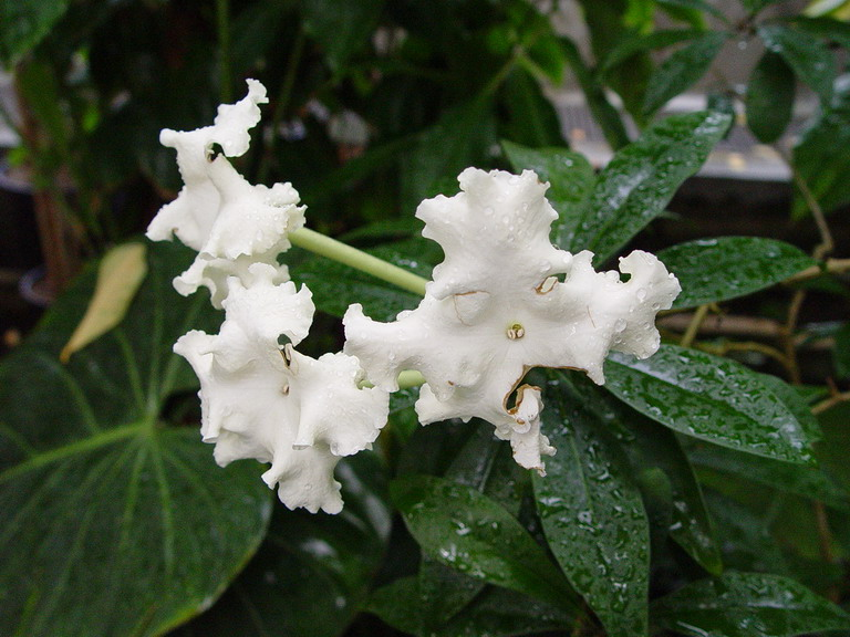 Brunfelsia undulata